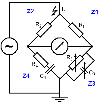 Meetbrug van Wien